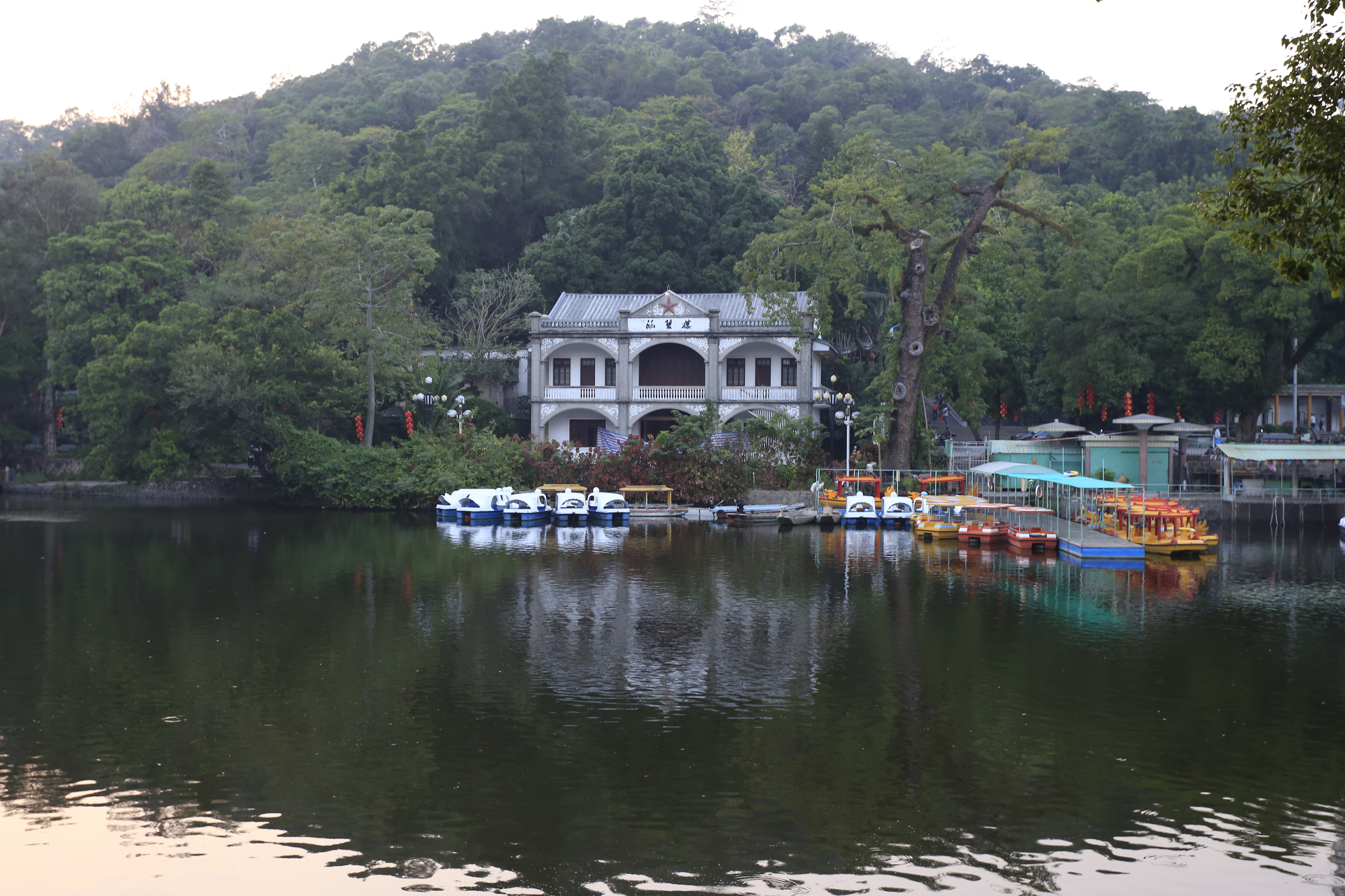 潮州涵碧楼